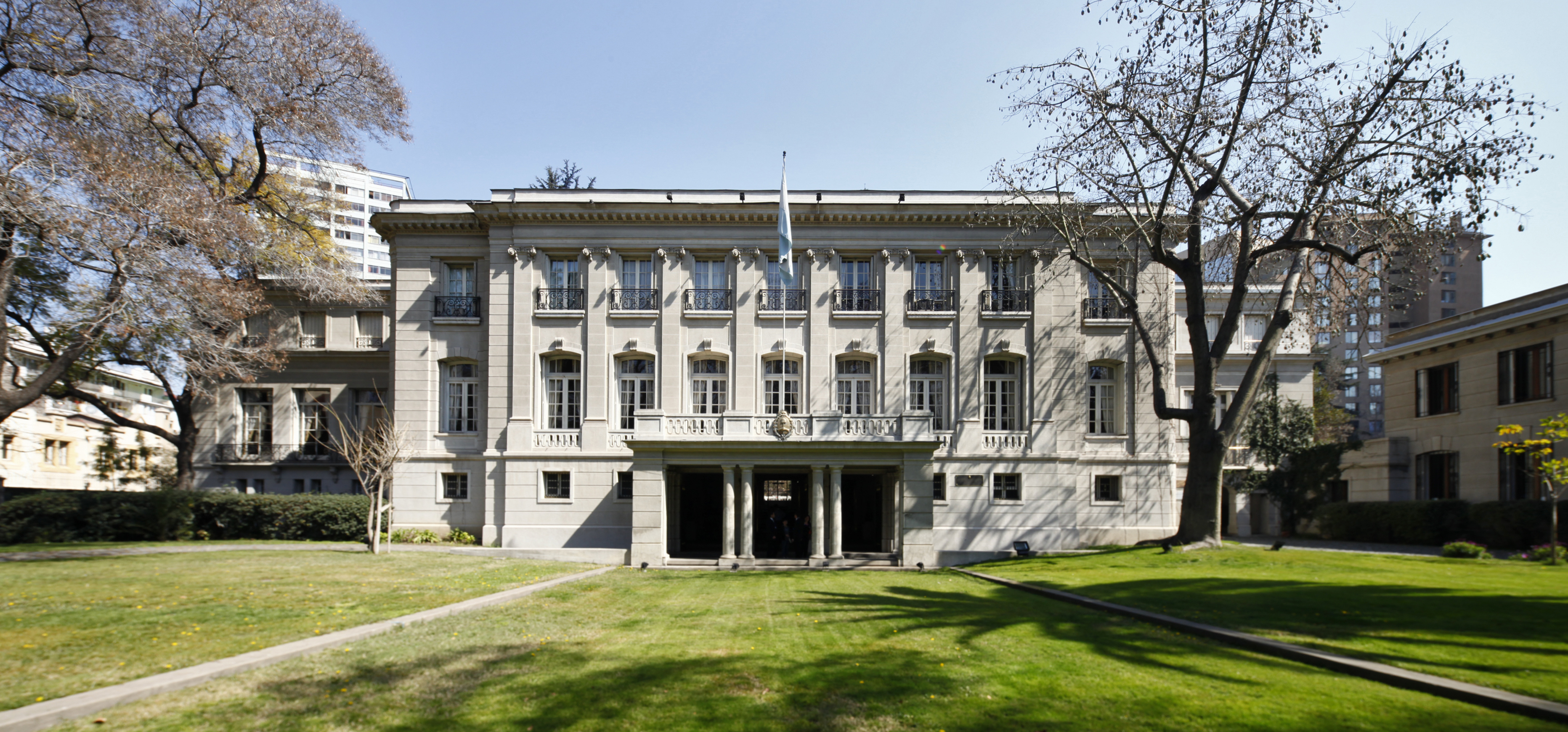 Sede de la Embajada de Argentina en Chile This is a photo of a national monument in Chile: 573